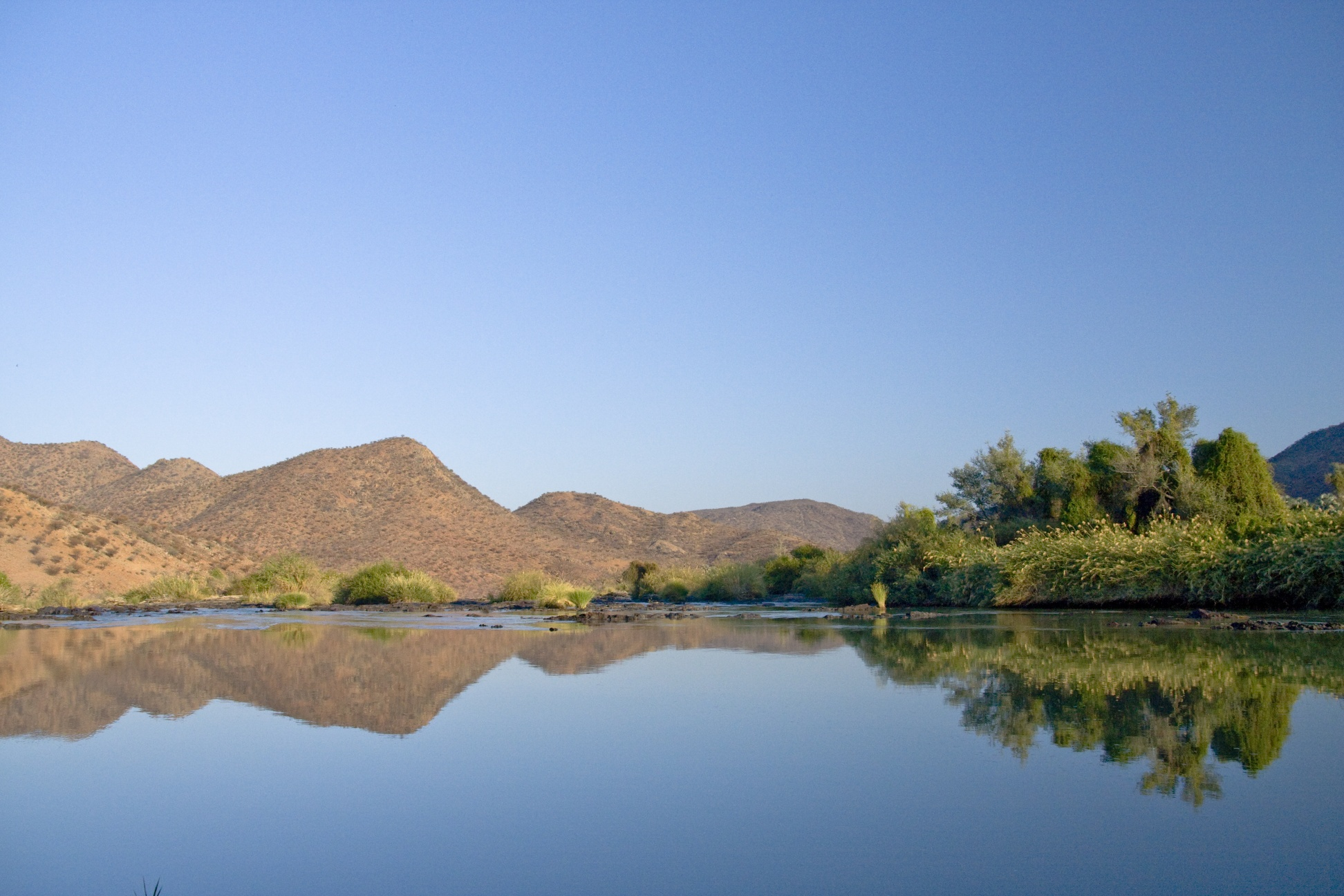 Epupa Falls, Namibia